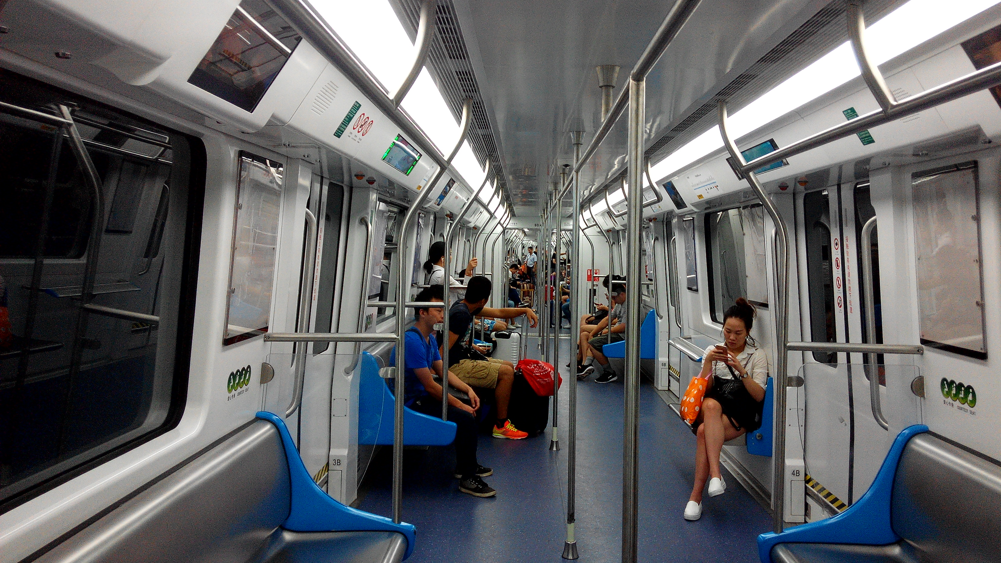 深圳地铁三号线 2015年 北车长客B型车